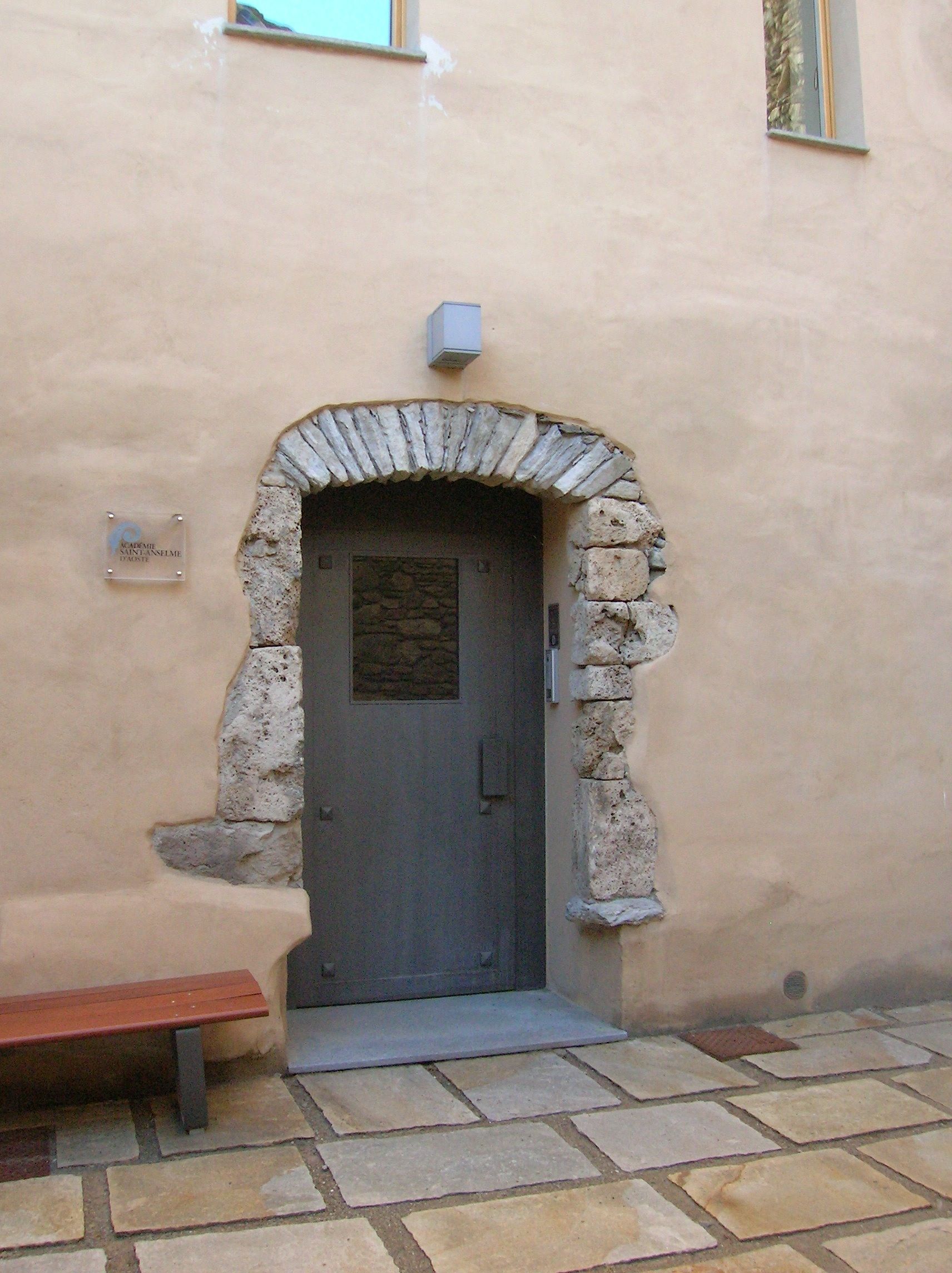 Accademia Sant'Anselmo nella Casaforte di Sant'Anselmo, Gressan, Valle d'Aosta, Italia. This is a photo of a monument which is part of cultural heritage of Italy.